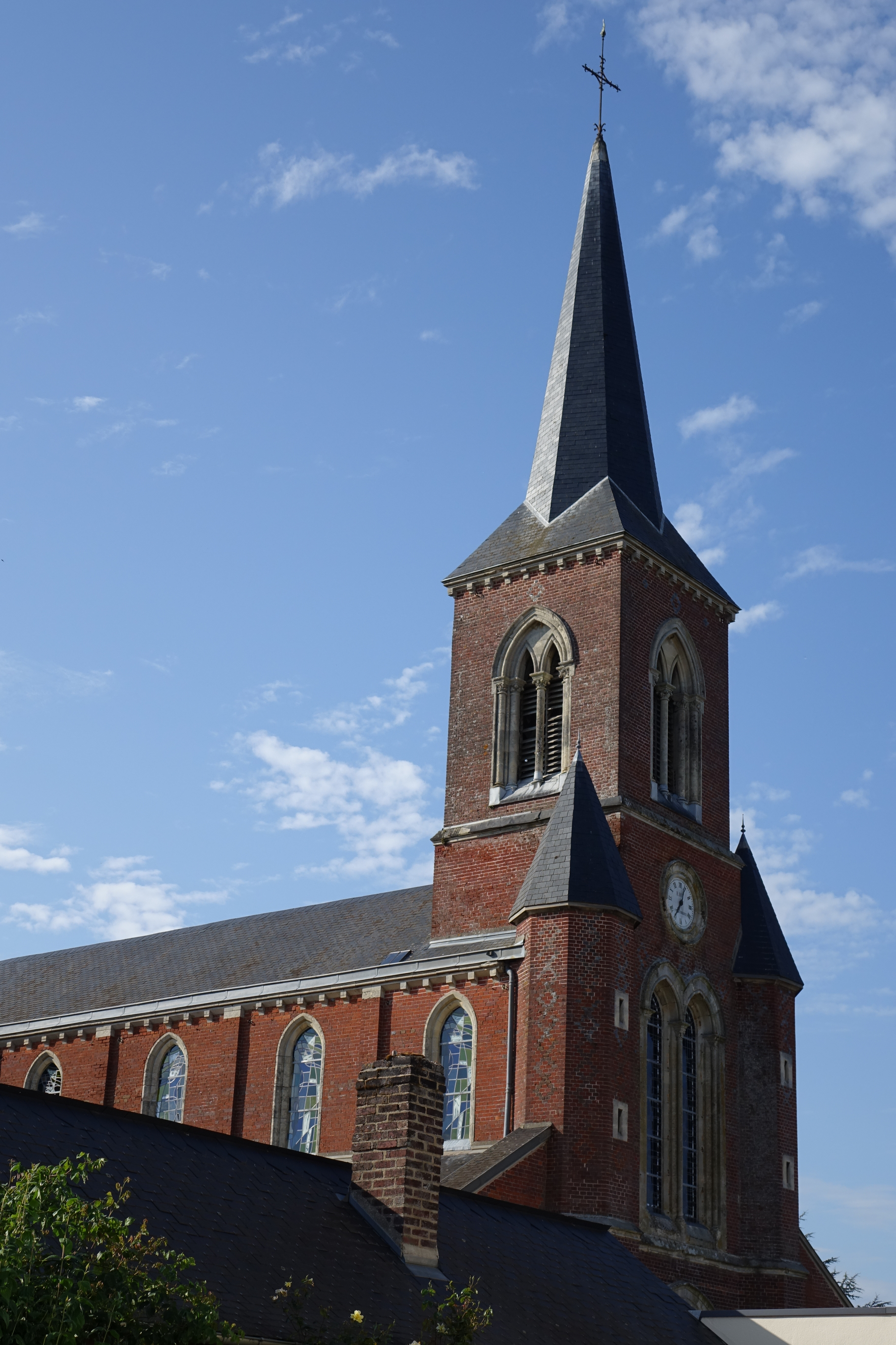 Église de Quincampoix, Seine-Maritime, France